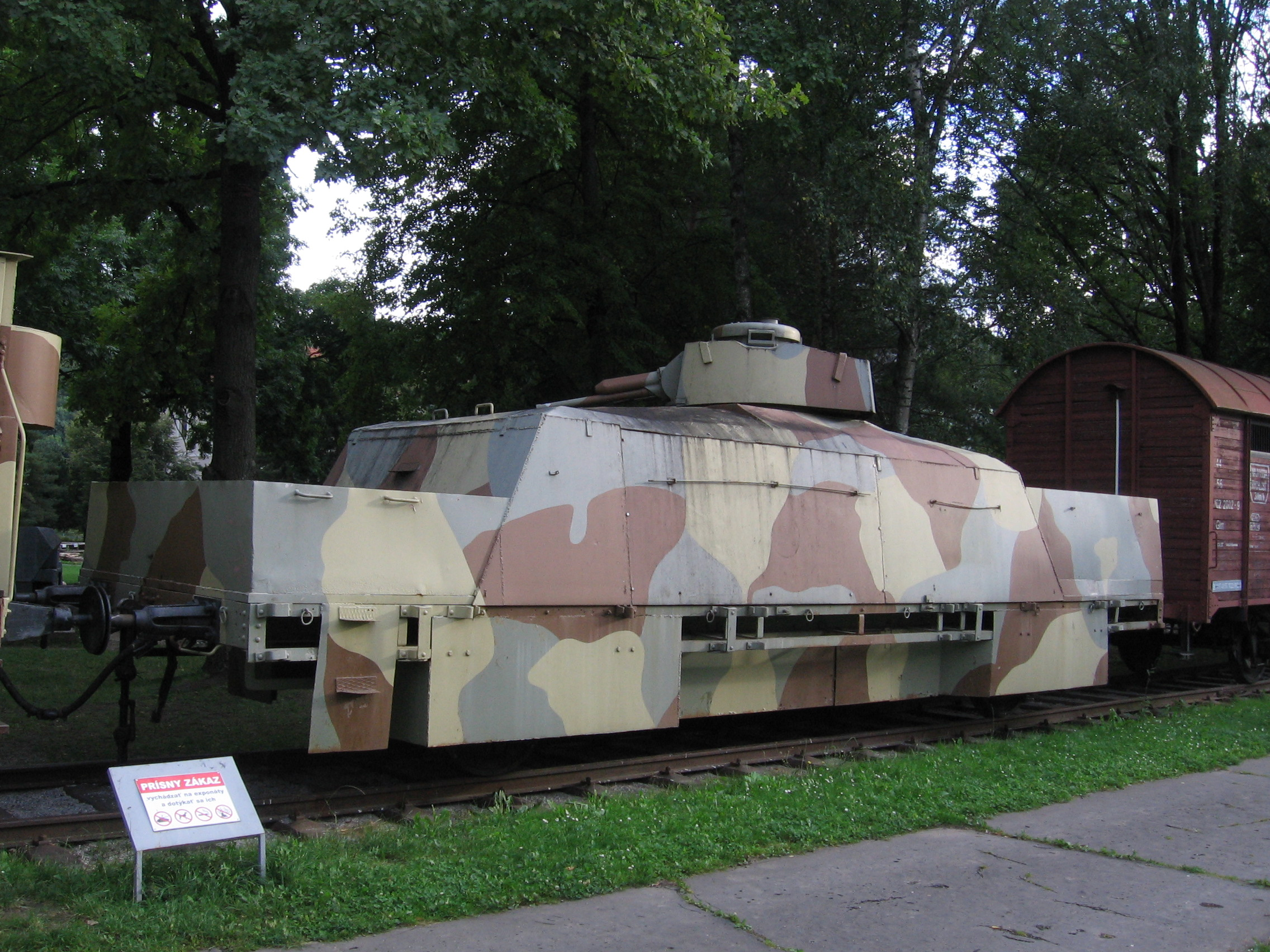 Pancéřový vlak Štefánik v muzeu SNP v Banskej Bystrici.